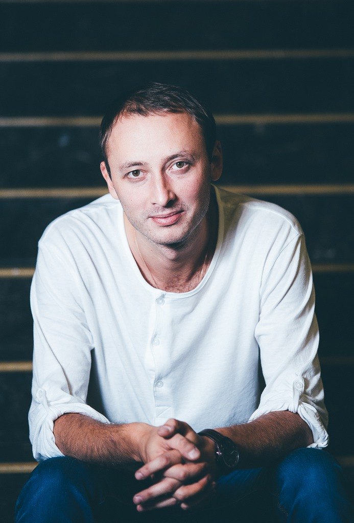 2015 год, г. Новосибирск